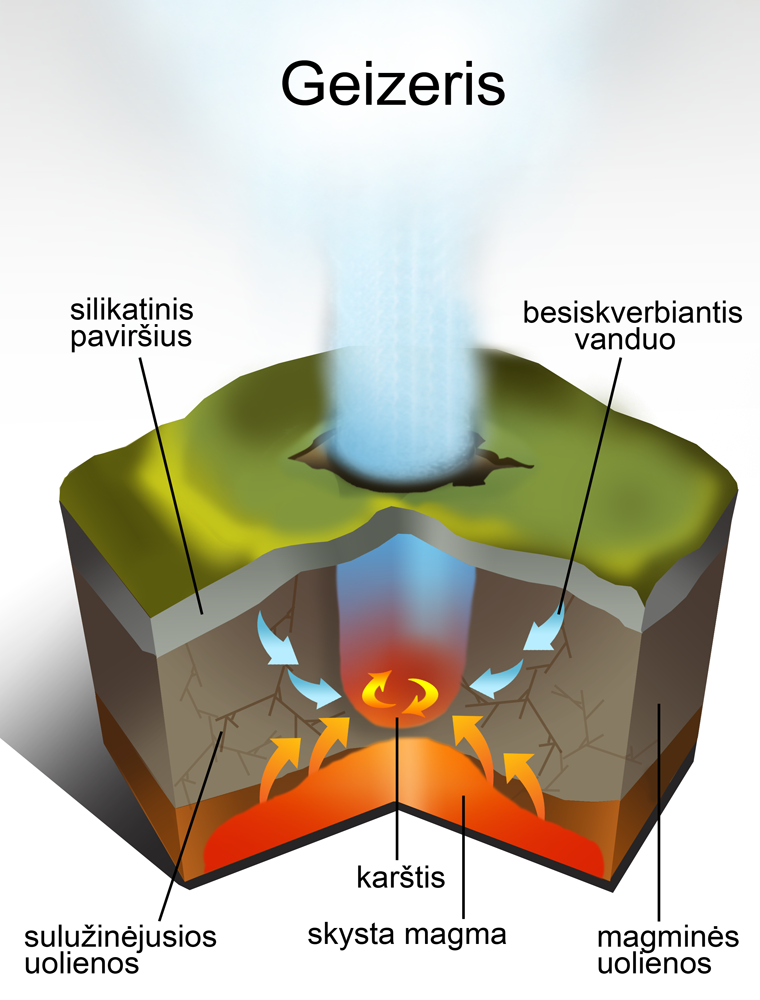 Geizerio veikimo schema